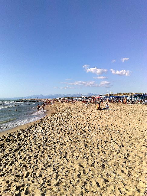 litorale pisano